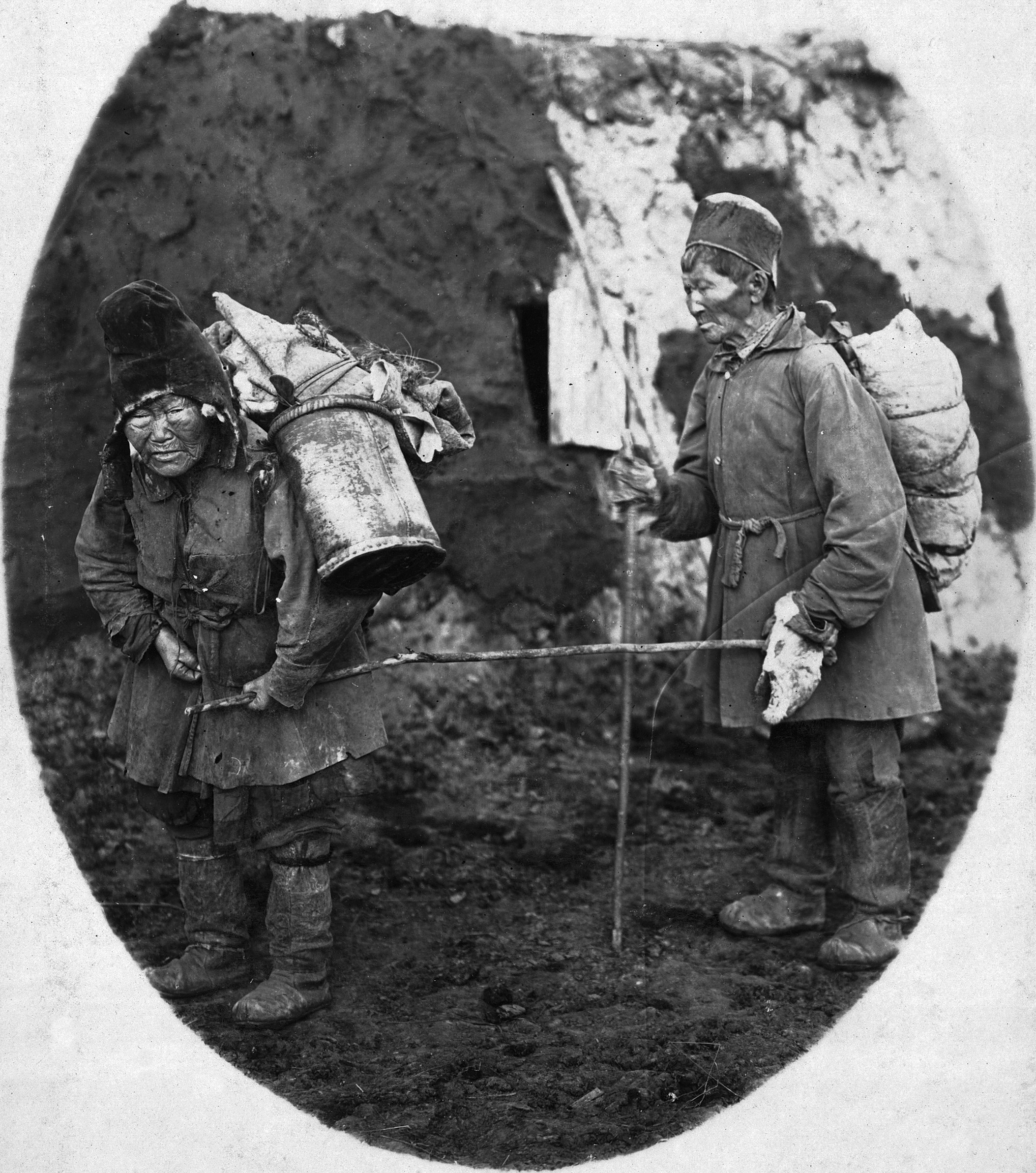 Якуты в дорожном снаряжении